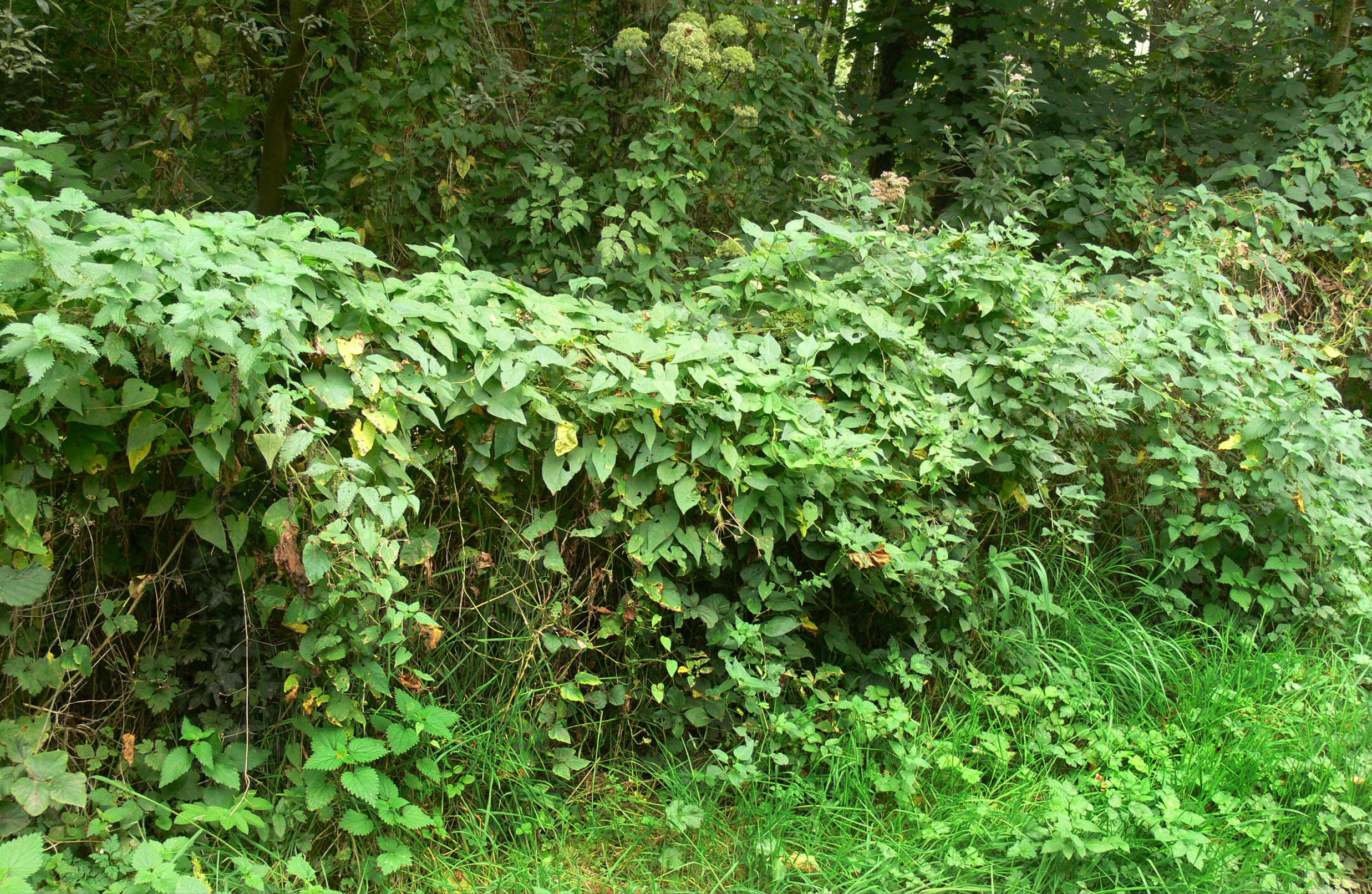 liseron couvrant un grillage Photo prise à Condette mi septembre 2006 (Parc Naturel Régional Cap et Marais d'Opale, Région Nord/Pas-de-Calais, France, Europe).